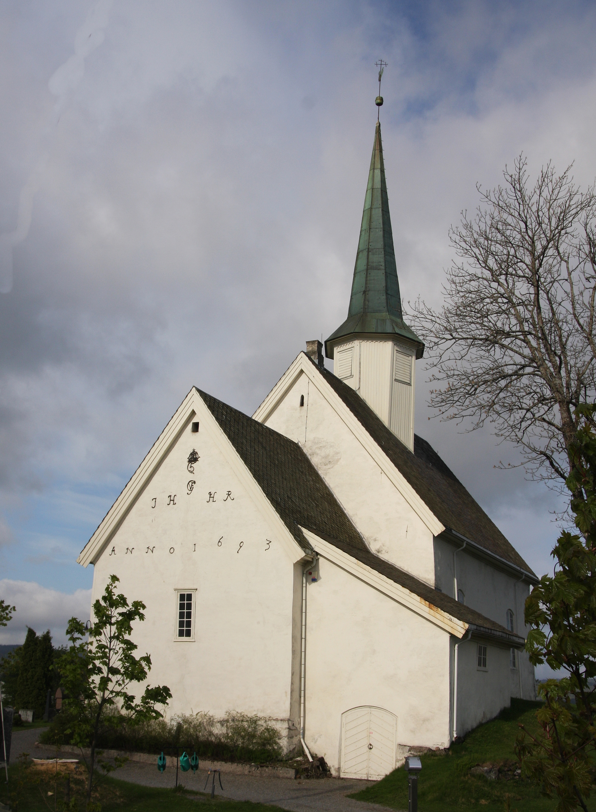 Nannestad kirke